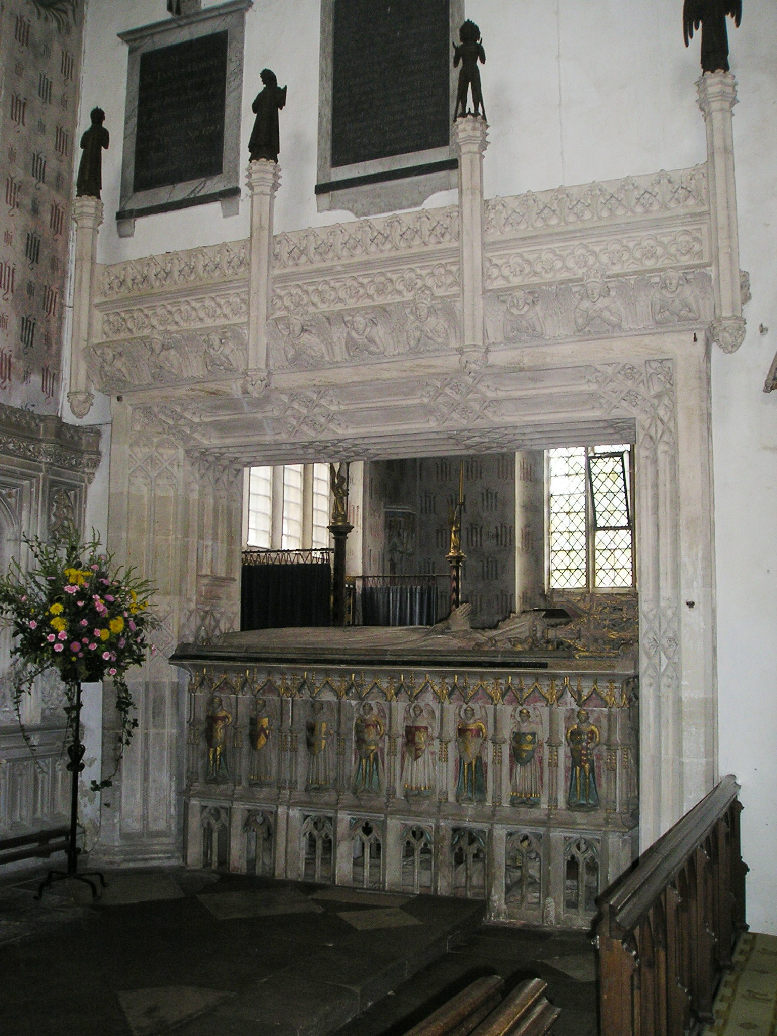 Ewelme,_Kirche_St_Mary_the_Virgin,_Alice-Grabmal. Church of St Mary the Virgin, Ewelme. North side of chest tomb of Alice Chaucer, Duchess of Suffolk (1404–1475), born Alice Chaucer, daughter of Thomas Chaucer (son of the poet Geoffrey Chaucer) and Matilda Burghersh. She married William de la Pole, 1st Duke of Suffolk (1396-1450). Her son was John de la Pole, 2nd Duke of Suffolk, who married Elizabeth of York, second surviving daughter of Richard of York, 3rd Duke of York (a great-grandson of King Edward III) and Cecily Neville. Elizabeth's brothers included the Yorkist kings Edward IV and Richard III. The monument was restored by Dr Kidd, Rector of Ewelme in 1848 and the shields were repainted. List of coats of arms on south s: (Source:[1], which incorrectly identified the arms of Chaucer as Burghersh throughout.) Arms (right to left/west to east): 1. De la Pole impaling Royal Arms of England (representing her son's marriage to Elizabeth of York). 2. De la Pole. 3. Chaucer. 4. Roet quartering Chaucer. 5. De la Pole quartering Chaucer. 6. Montacute and Monthermar quartering and impaling Mohun. 7. De la Pole impaling Neville (sic, perhaps Stafford?). 8. Roet impaling Chaucer.